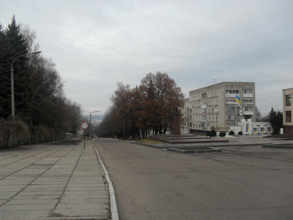 У центрі міста Верхньодніпровська (Україна)